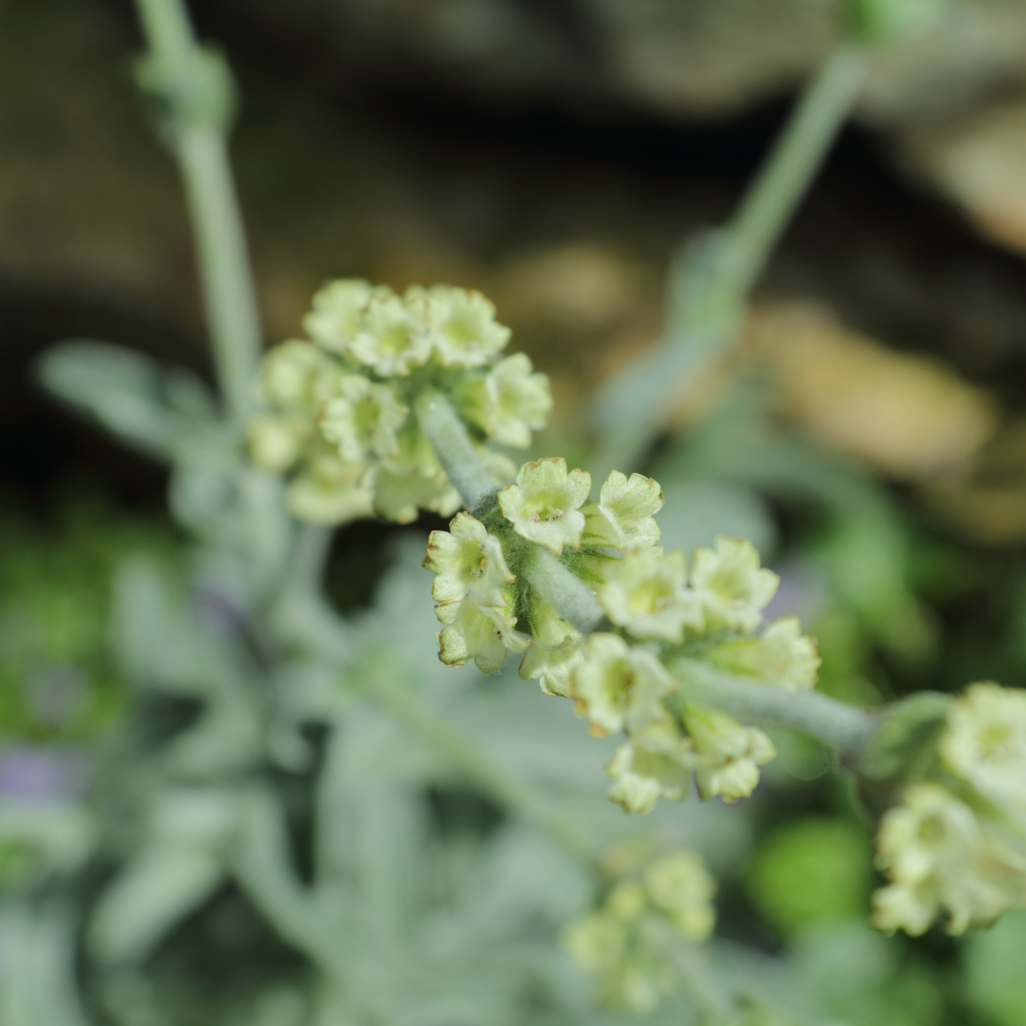 Sideritis syriaca identifierad med hjälp av befintlig skylt vid Bergianska trädgården.